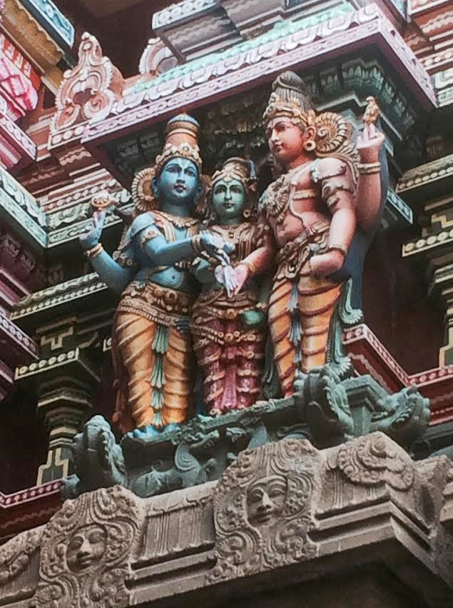 Meenakshi au centre, avec son frère Vishnou à gauche sur la photo et son époux Shiva à droite sur la photo (photo iphone) Ce temple, de style dravidien tardif, reconstruit et agrandi au milieu du XVIIème siècle, est une véritable cité religieuse en plein coeur de la ville de Madurai. Il comprend deux sanctuaires situés dans l'enceinte et reliés par de multiples couloirs, salles aux mille piliers et bassins d'ablutions : - celui consacré à Meenakshi, la déesse "aux yeux en forme de poisson" , - celui consacré à Sundareshwara, son époux Meenakshi est la soeur de Vishnou et l'épouse de Shiva (incarné en Sundareshwara) . Elle est une des formes de Parvati. Chaque soir, l'époux est conduit en procession auprès de sa déesse pour s'unir symboliquement et renouveler l'énergie de l'Univers. Le matin, il est reconduit dans son sanctuaire. Les non-hindous ne peuvent pénétrer dans les deux sanctuaires mais peuvent circuler dans les autres parties du temple, à condition d'être sans chaussures et de laisser leurs appareils photographiques à l'entrée. Seuls les téléphones portables sont permis et ils peuvent être utilisés. Ce temple est caractéristique du style dravidien, propre à l'Inde du sud, avec ses douze gopuram(s) qui se dressent au-dessus des murs du temple. Site du temple de Meenakshi Article Wikipedia sur Madurai Extrait de la cérémonie de l'Aarti qui se déroule chaque soir dans le temple